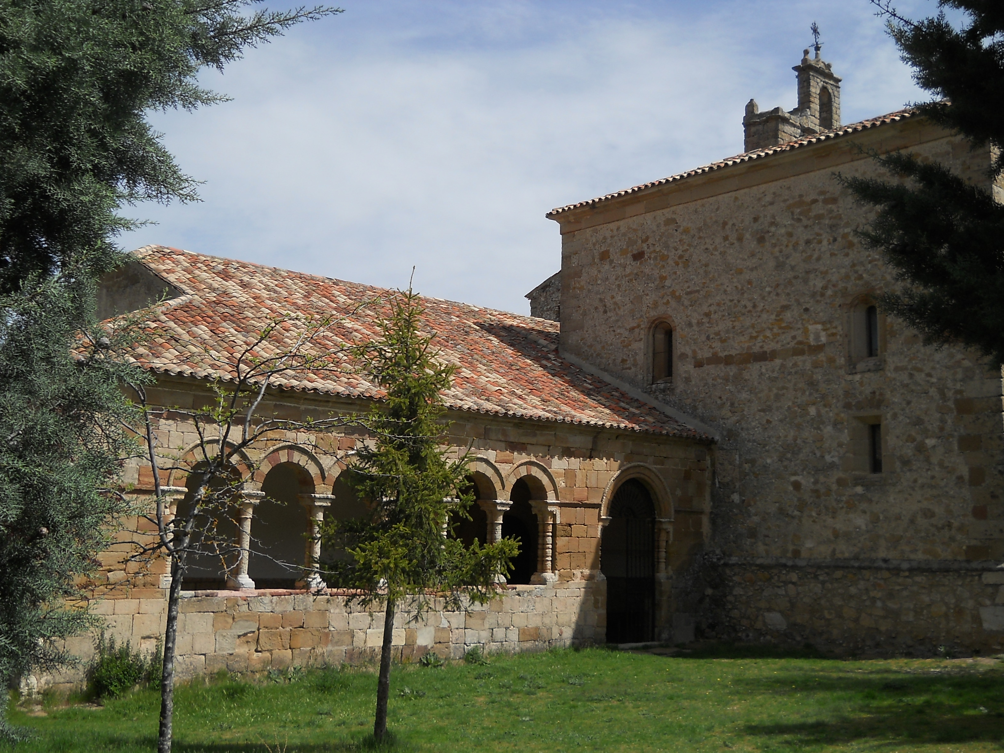 Iglesia de San Bartolomé, Atienza, Guadalajara, España